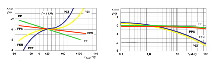 Kapazitätsänderungen bei Folkos in Abhängigkeit von der Temperatur und der Frequenz